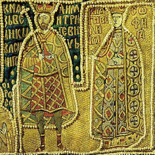 Василий I и Софья Витовтовна (лицевое шитье саккоса митрополита Фотия